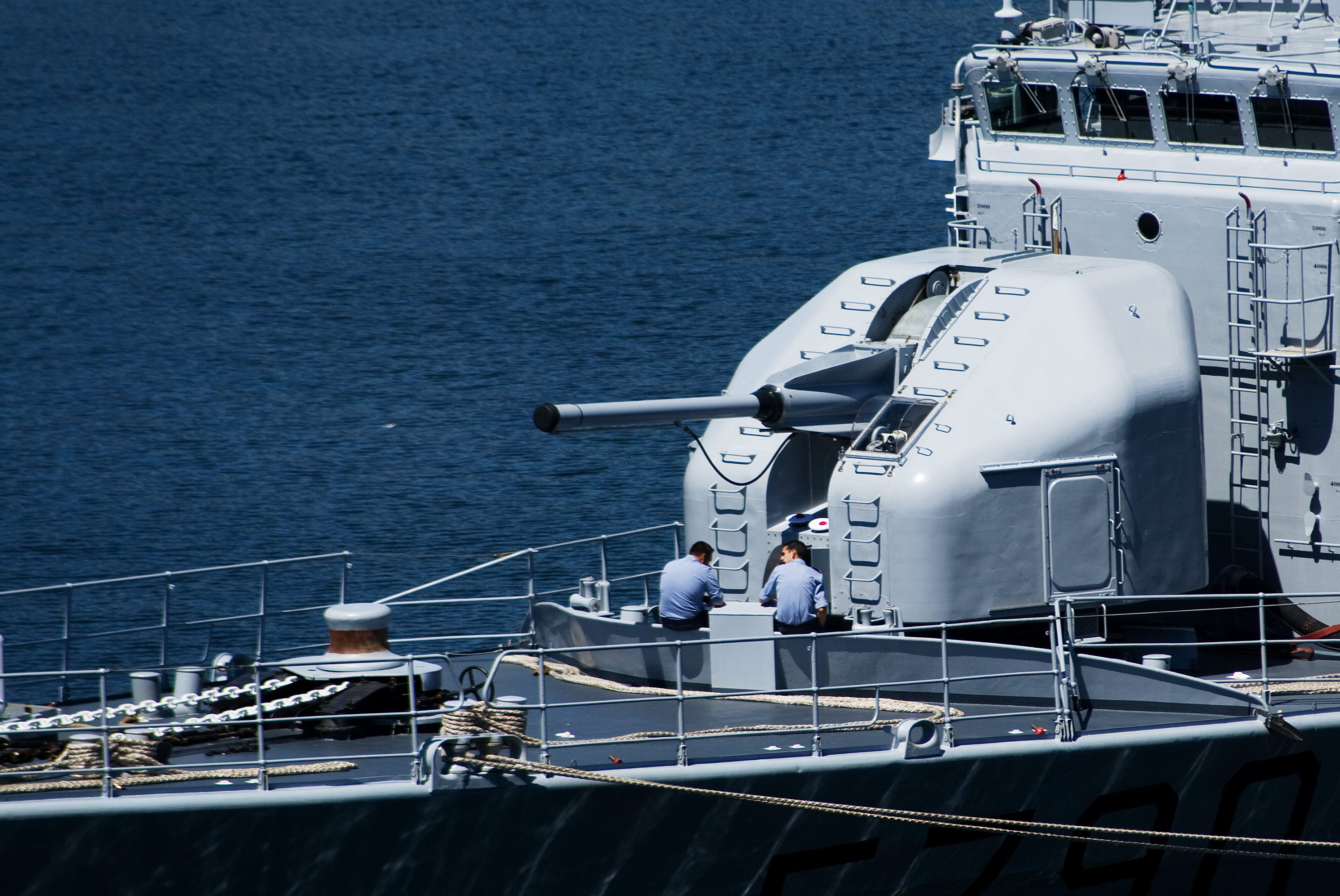 Canon de 100 mm sur la plage avant du Lieutenant de vaisseau Lavallée